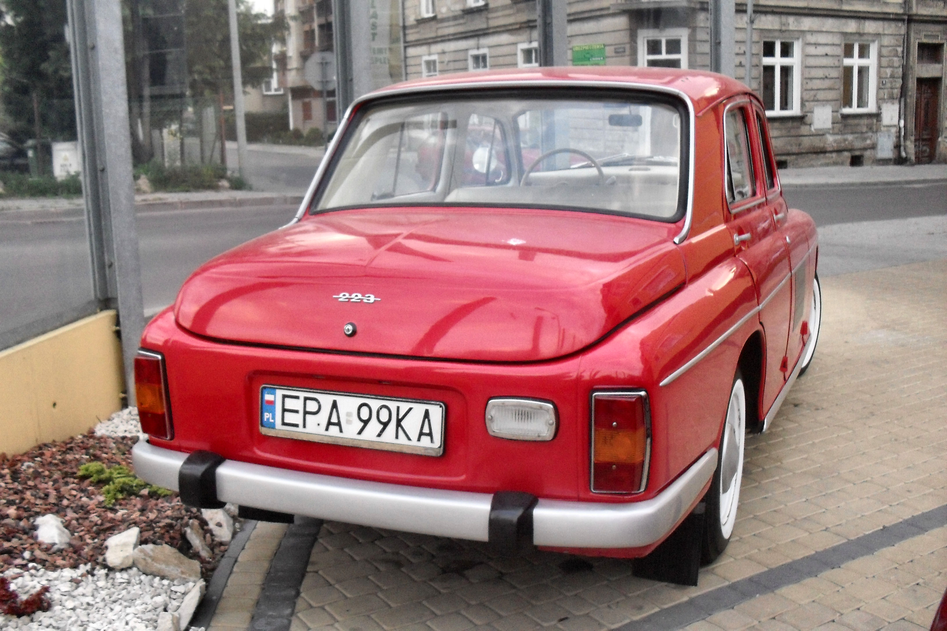 FSO Warszawa 223 w Jaśle.